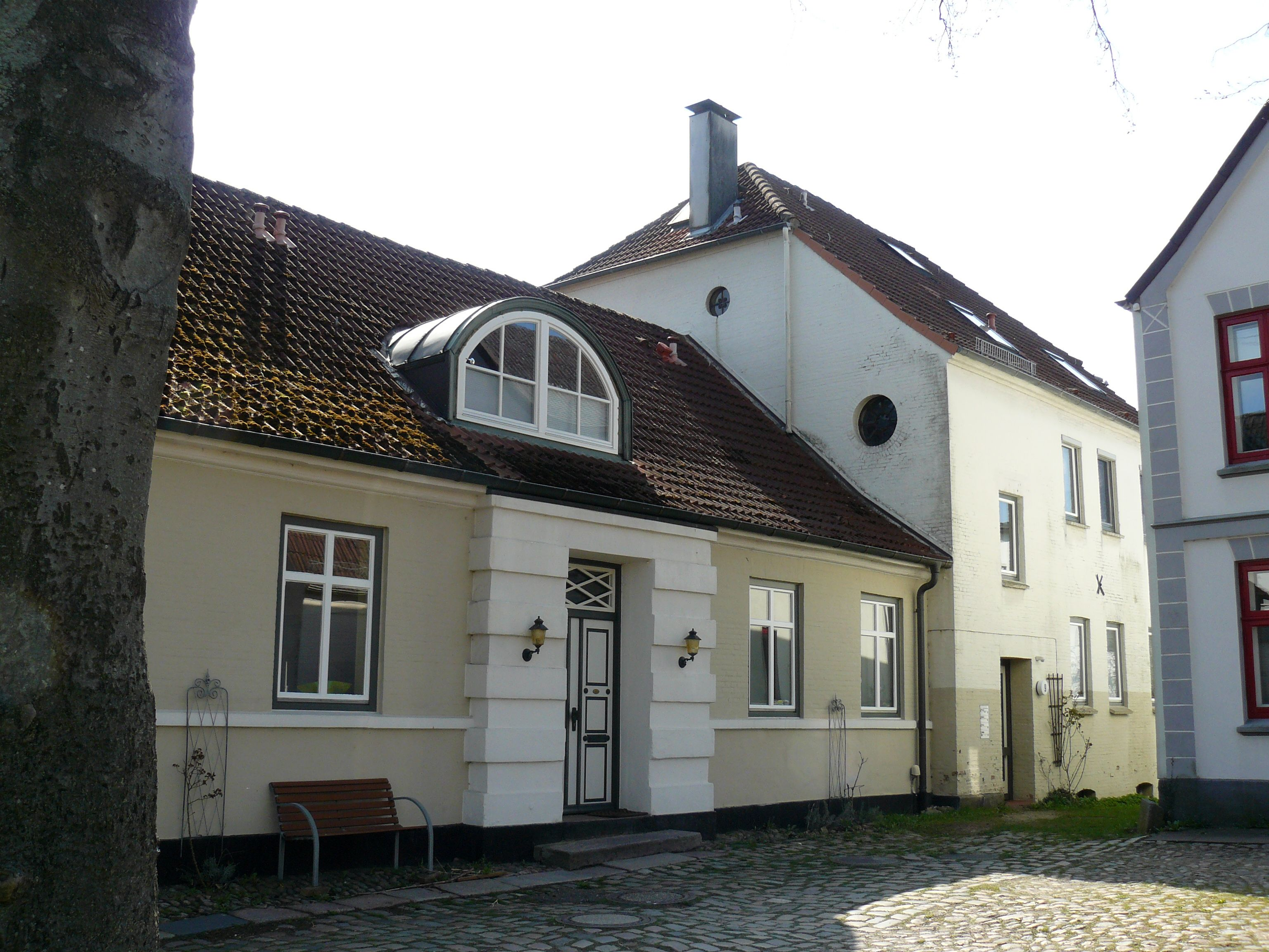 Ursprünglich als Gefängnis errichtet